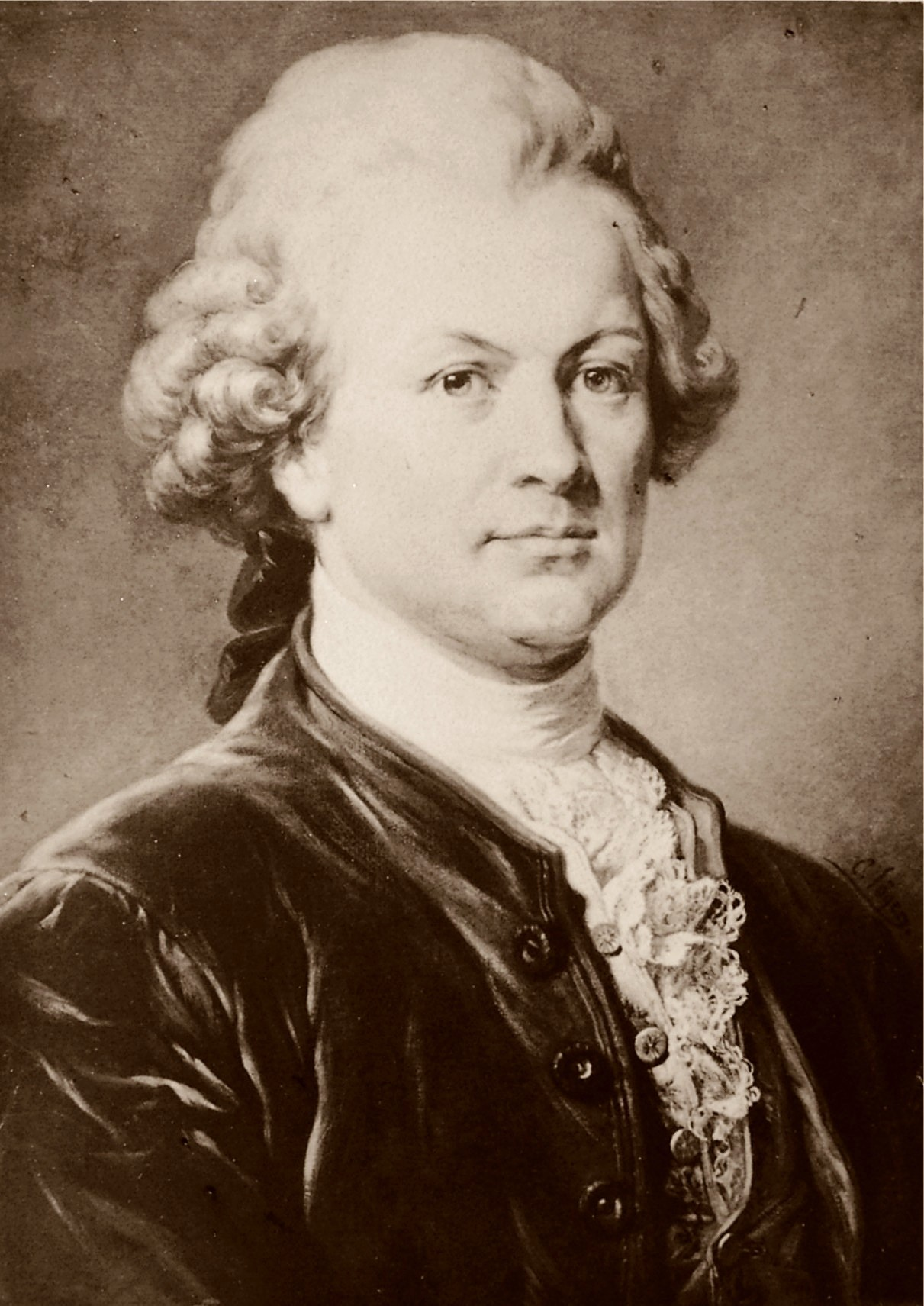 Gotthold Ephraim Lessing (1729-1781) war der wichtigste deutsche Dichter der deutschen Aufklärung.